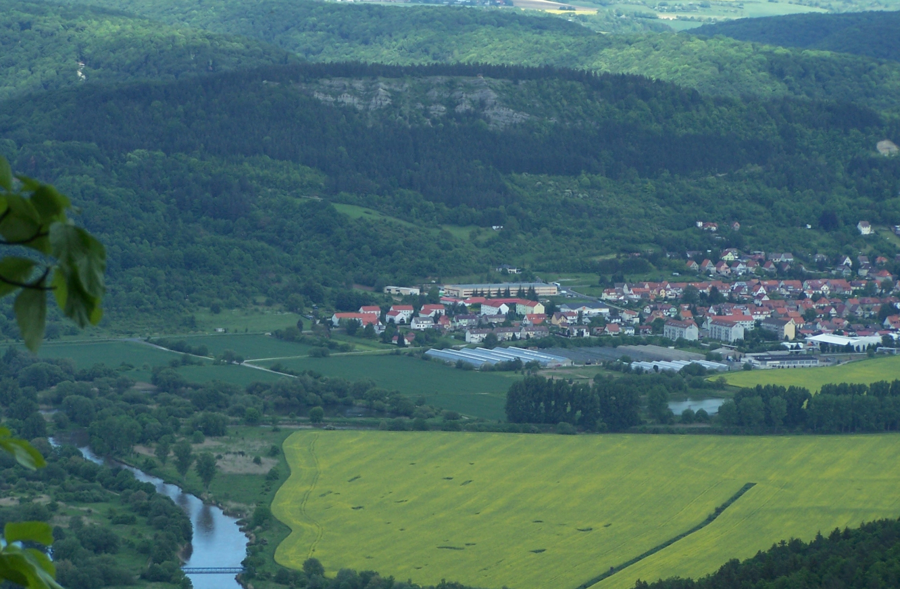 Der westliche Treffurter Stadtteil mit der Adolfsburg.